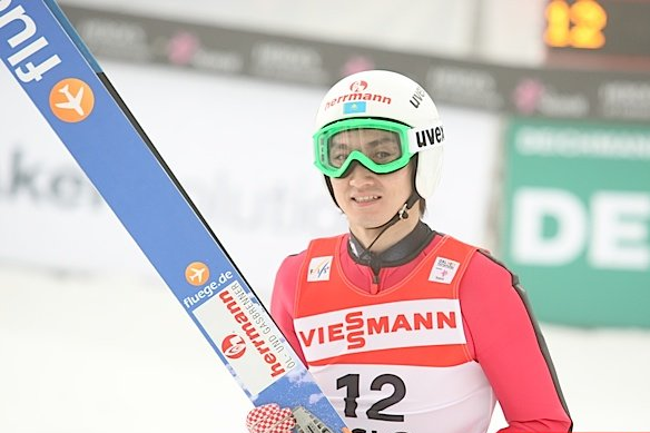 Radik Żaparow podczas serii kwalifikacyjnej przed konkursem indywidualnym mężczyzn na skoczni normalnej na Mistrzostwach Świata w Narciarstwie Klasycznym 2011 w Oslo.